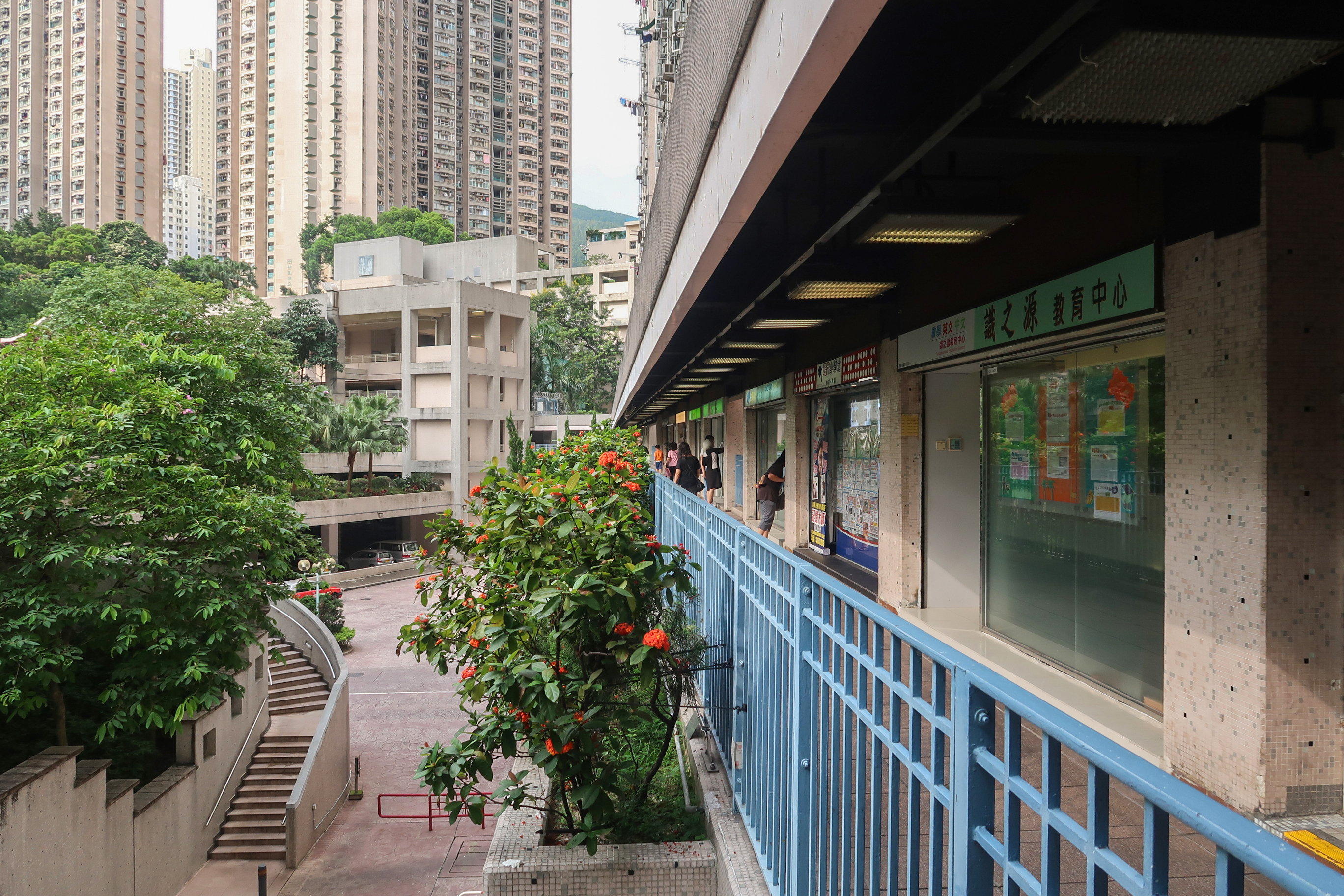 Fung Tak Estate Ngan Fung House shops